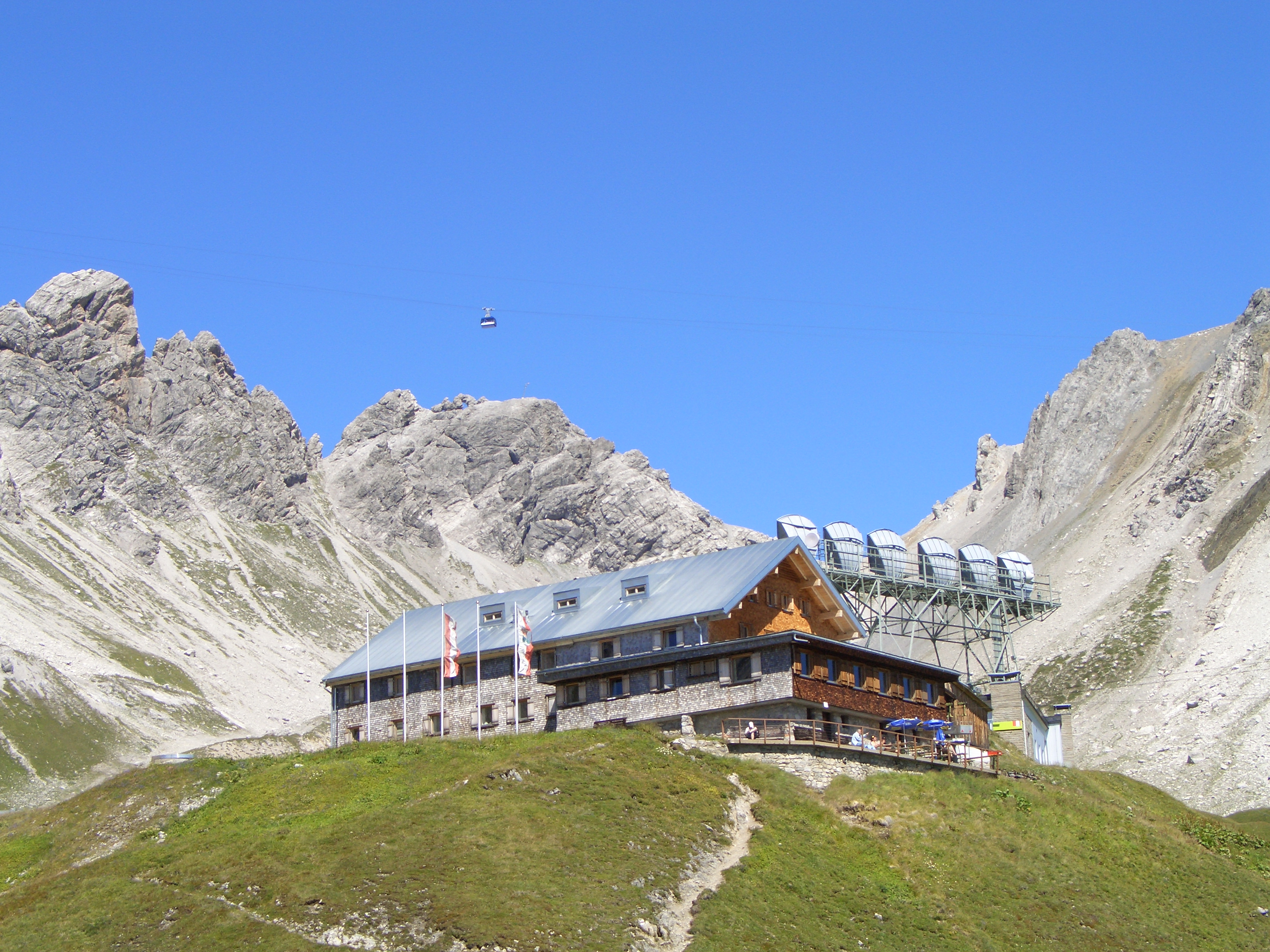 Ulmer Hütte mit Valluga-Seilbahn und Fernmeldeantennen